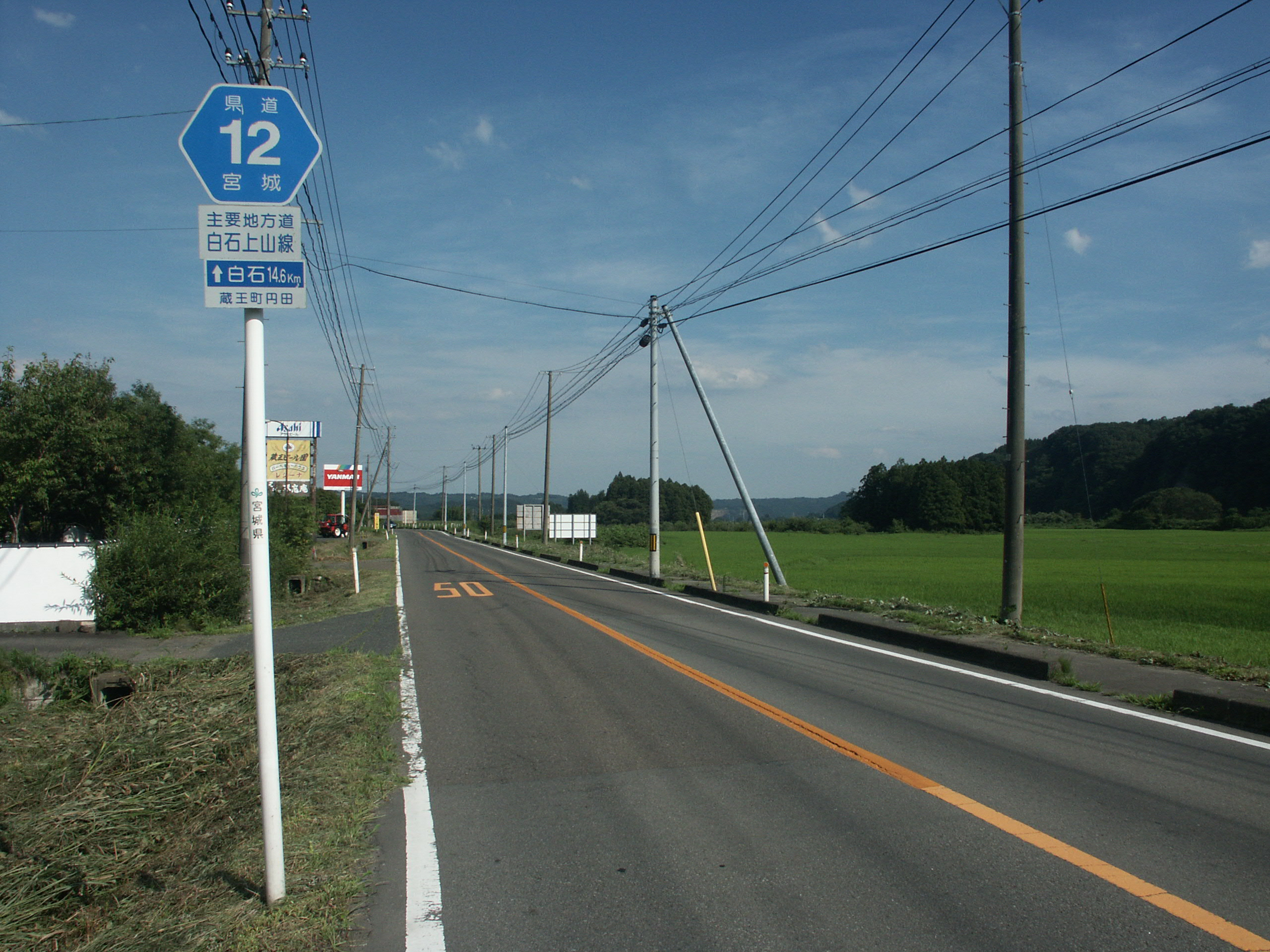 宮城県道12号線蔵王町円田付近